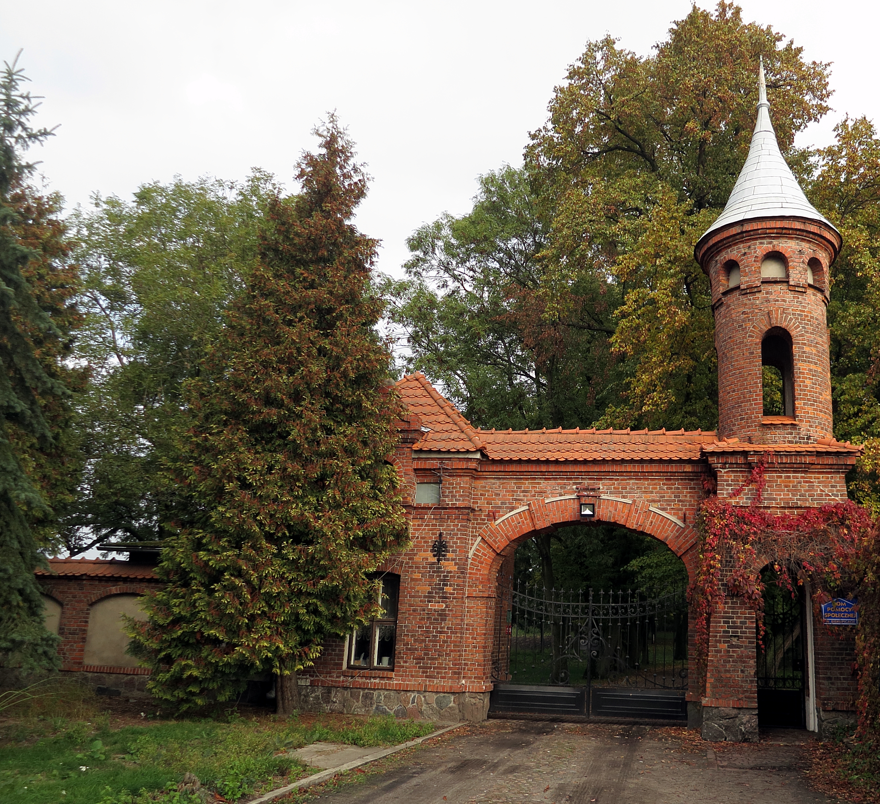 gmina Sieradz, pa³ac, pocz. XX